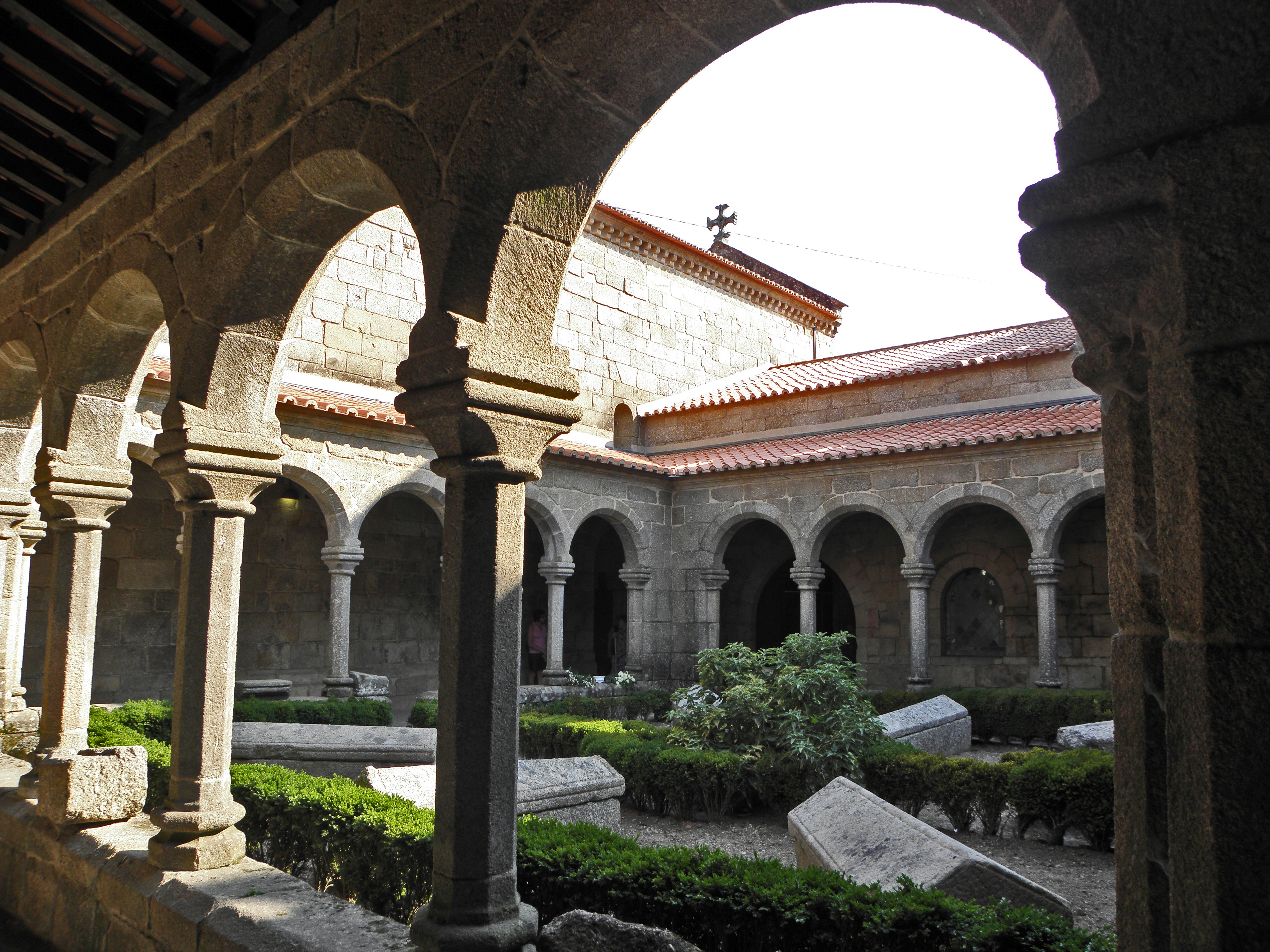 A Igreja de S. Pedro de Cete, monumento Românico/Gótico, fazia parte do complexo conventual do antigo Mosteiro. Sofreu sucessivas reformas, fundamentalmente, no primeiro quartel do século XIV e no século XVI. Nos finais do século XIX e durante o século XX realizaram-se várias intervenções de conservação e restauro. O edifício caracteriza-se por nave única de planta longitudinal e capela-mor circular, abóbadada com dois arcos torais, exteriormente reforçada por oito botaréus e três frestas, e interiormente rodeada de arcadas cegas. Na fachada principal abre-se um portal amplo, ogival, com quatro arquivoltas assentes sobre pilastras e colunas com capitéis lavrados e bolas nos ábacos. Encima-o uma pedra de armas esquartelada e uma rosácea gótica. A norte está adossada uma torre quadrangular quatrocentista, com ameias, merlões de perfil recortado e dois algerozes zoomórficos. A flanquear a entrada sobressai um possante botaréu cingido por uma corrente de granito, ao gosto manuelino. No flanco Norte há um portal de arco quebrado, lavrado com renques de quadrifólios e outro mais pequeno com arco de volta perfeita. O arco triunfal é quebrado, sobre colunas de capitel decorado e encimado por óculo preenchido com uma cruz. Do lado Norte, na capela-mor, encontra-se o túmulo do Abade D. Estêvão, epigrafado e com estátua jacente sobre a tampa. Azulejos mudéjares do século XVI envolvem o arcossólio de D. Gonçalo Jacques. Surgem anexadas ao templo as antigas dependências conventuais, a sala capitular e o claustro manuelino. Este monumento tem um enquadramento rural, ainda com alguma tipicidade que se impõe preservar.